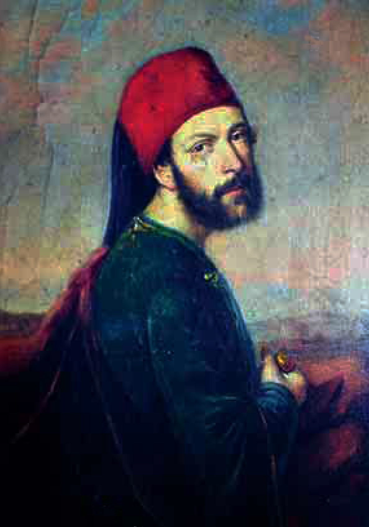 Ritratto di Luigi Dottesio, patriota comasco, conservato presso il museo civico di Como.